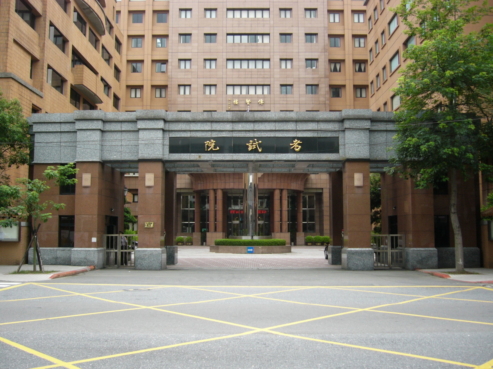 中華民國考試院院區大門，位於臺北市文山區試院路1號。